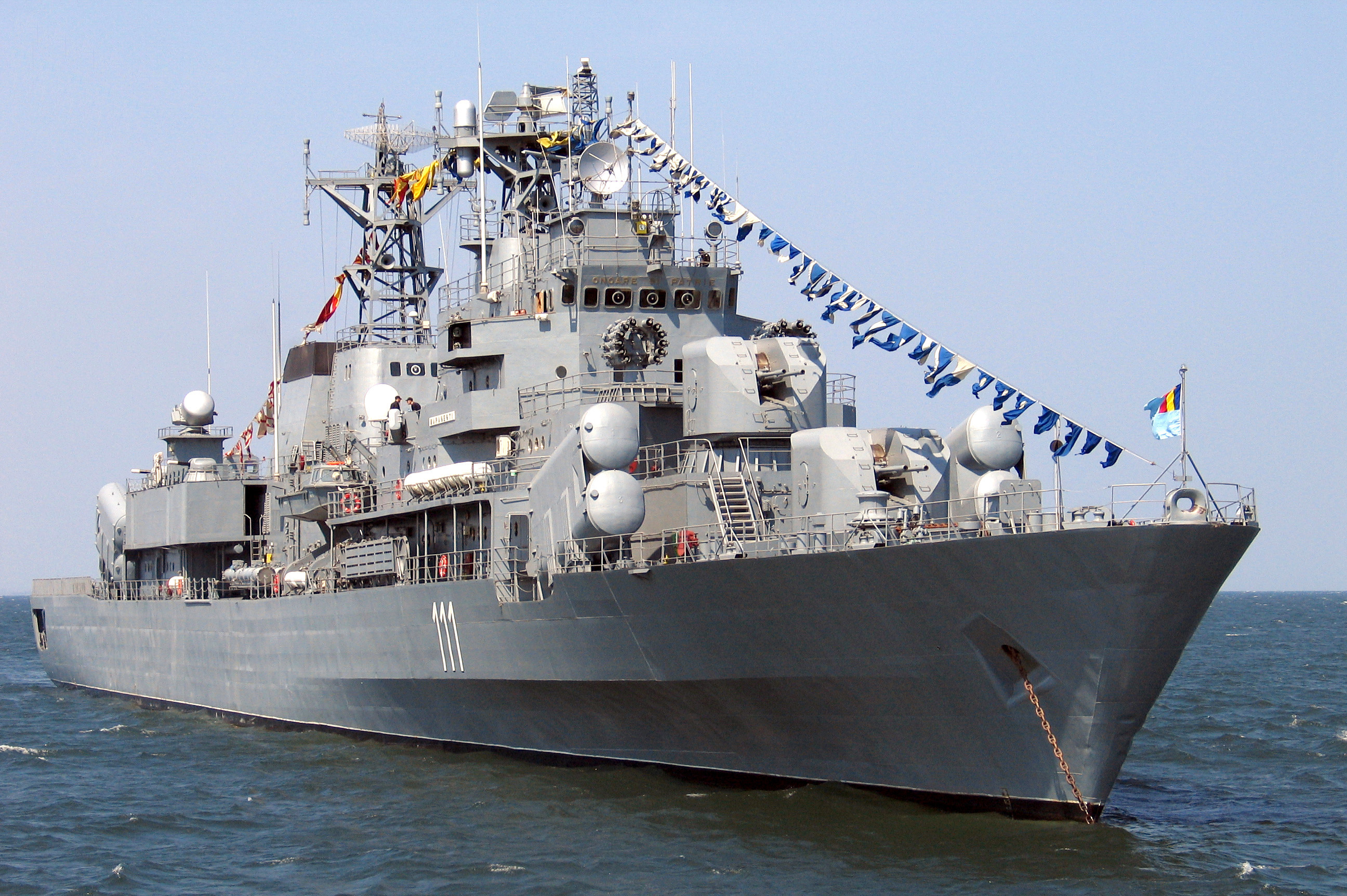 Mărășești (F-111) frigate.